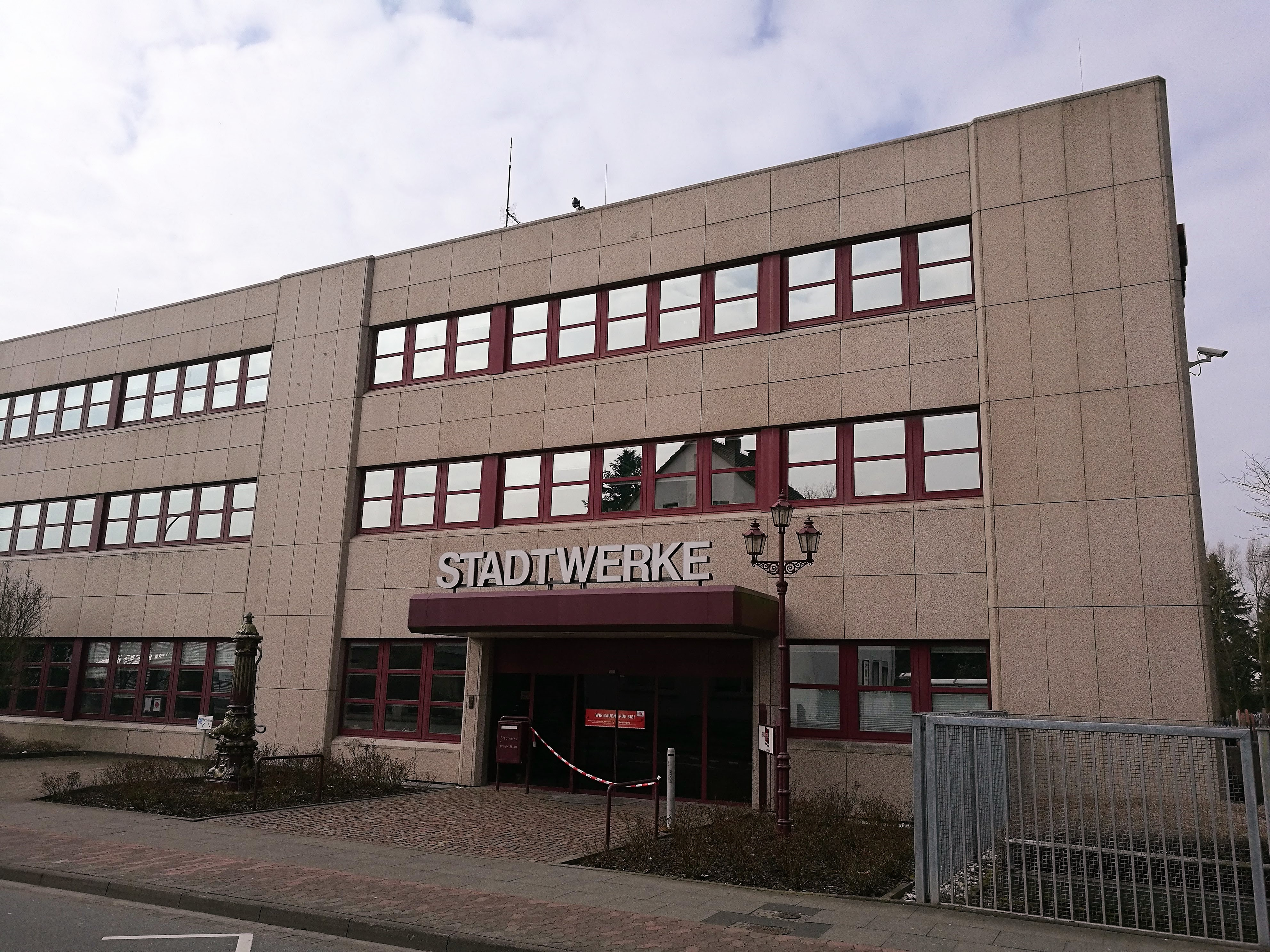 Stadtwerke Bad Salzuflen Haupterwaltung